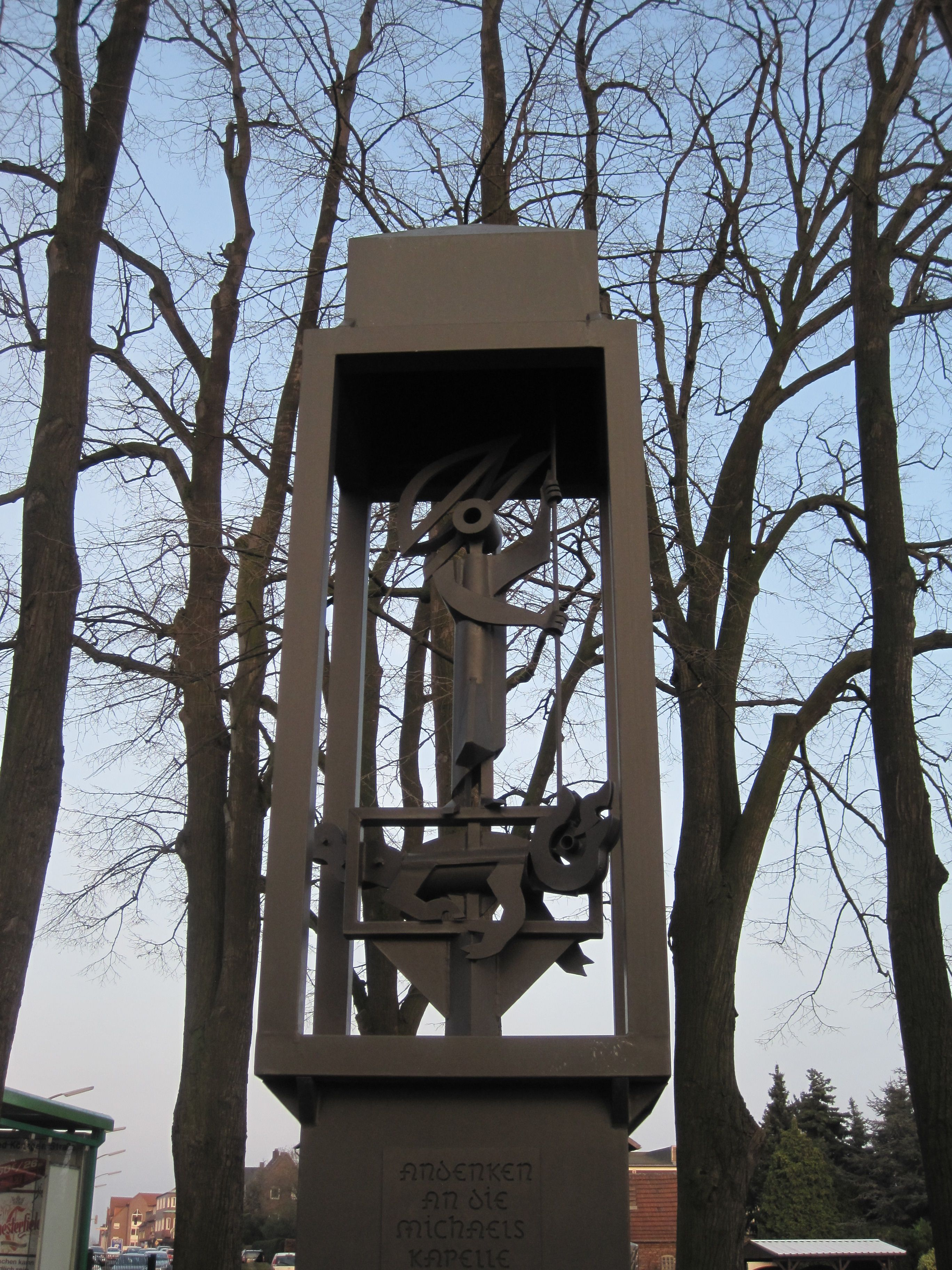 Das Foto zeigt eine Michaelskulptur in Hamm-Bockum-Hövel, Ecke Stockumer Straße/Hammer Straße, die an die früher dort befindliche St. Michael-Kapelle erinnern soll.